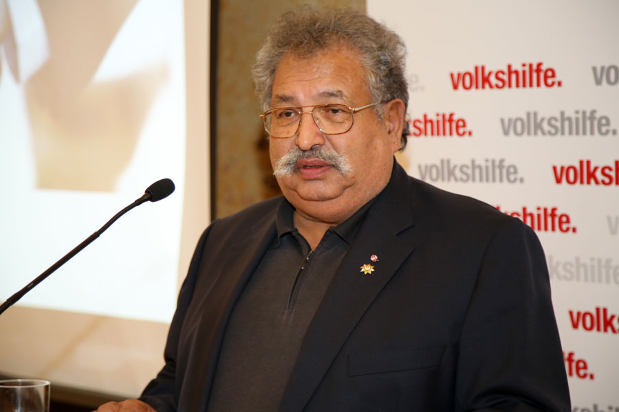 Rudolf Sarközi-1784